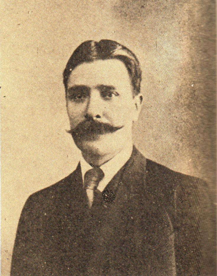 General Herminio Álvarez